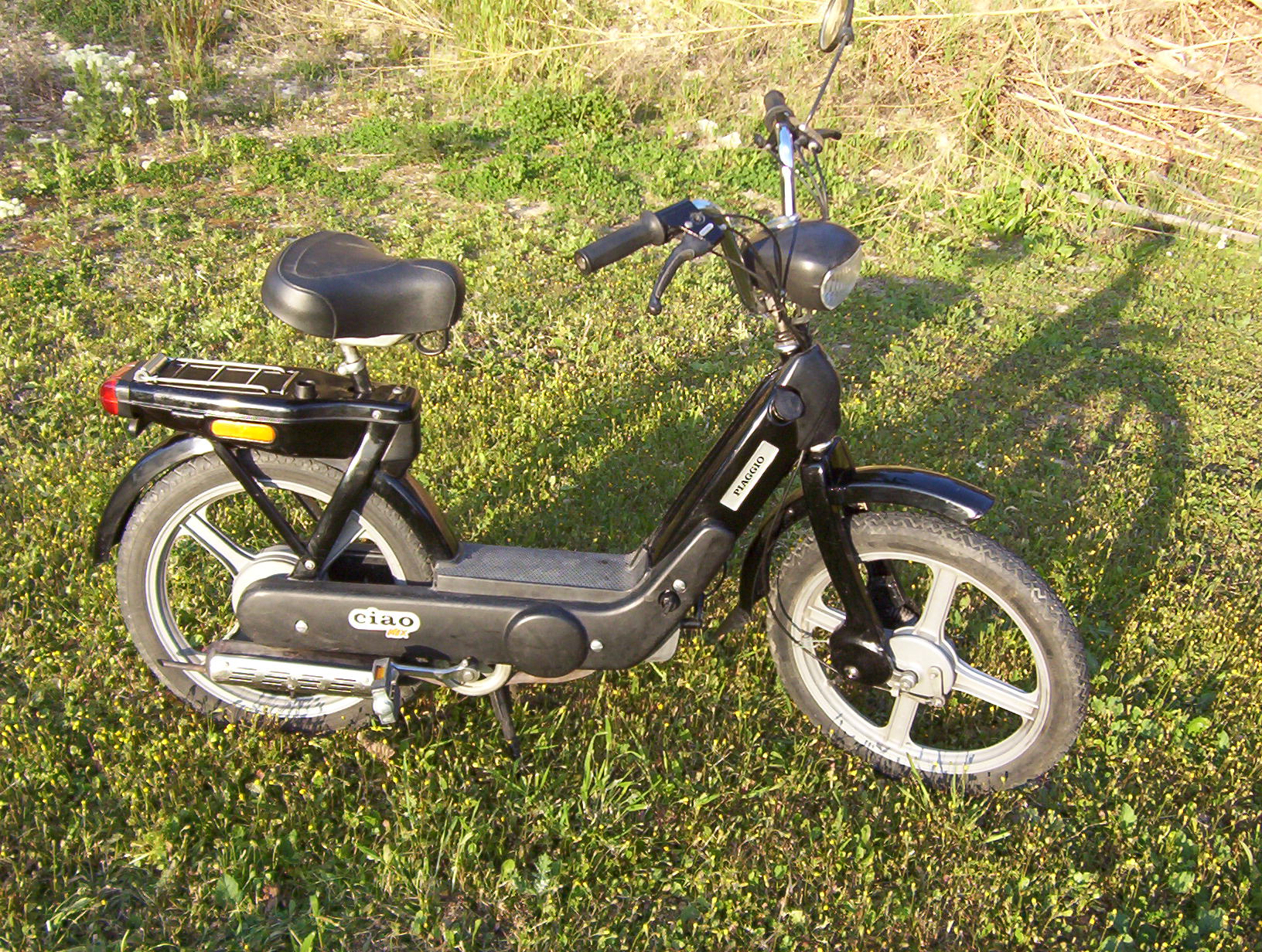 Ciao Mix